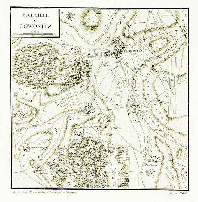 Схема битвы при Лобозице